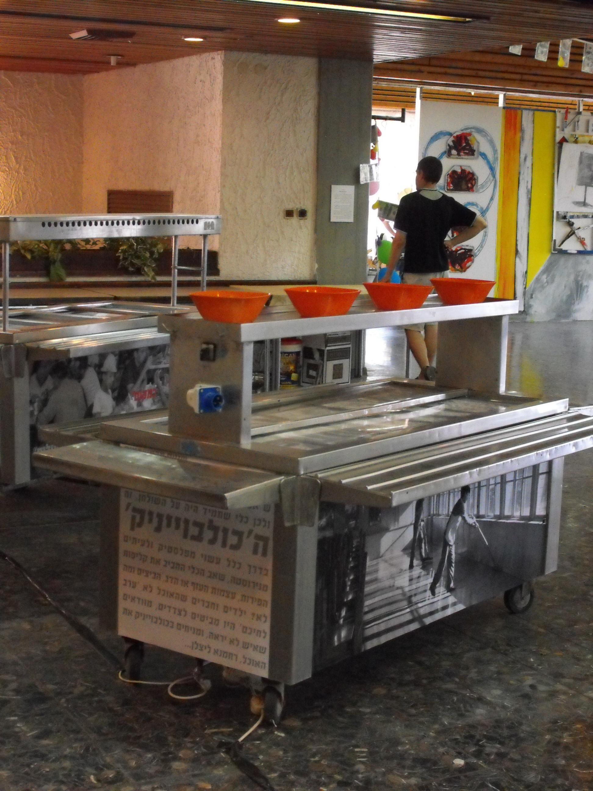 תערוכה: "זמן קיבוץ - חדר אוכל כמשל".